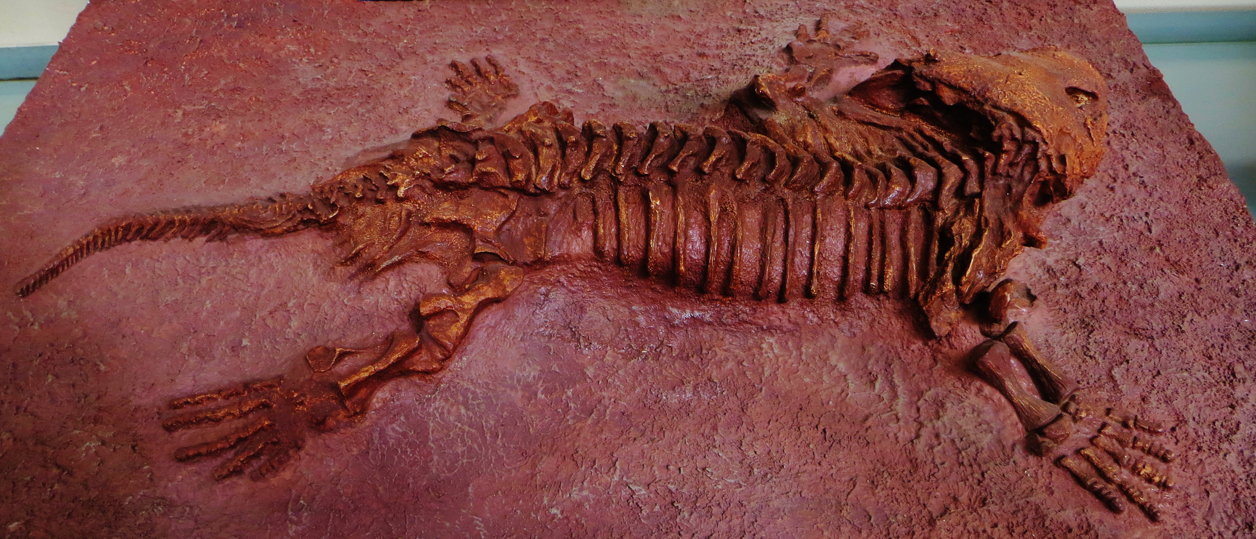 Fossil of Seymouria, an extinct tetrapod- Took the photo at Musee d'Histoire Naturelle, Paris